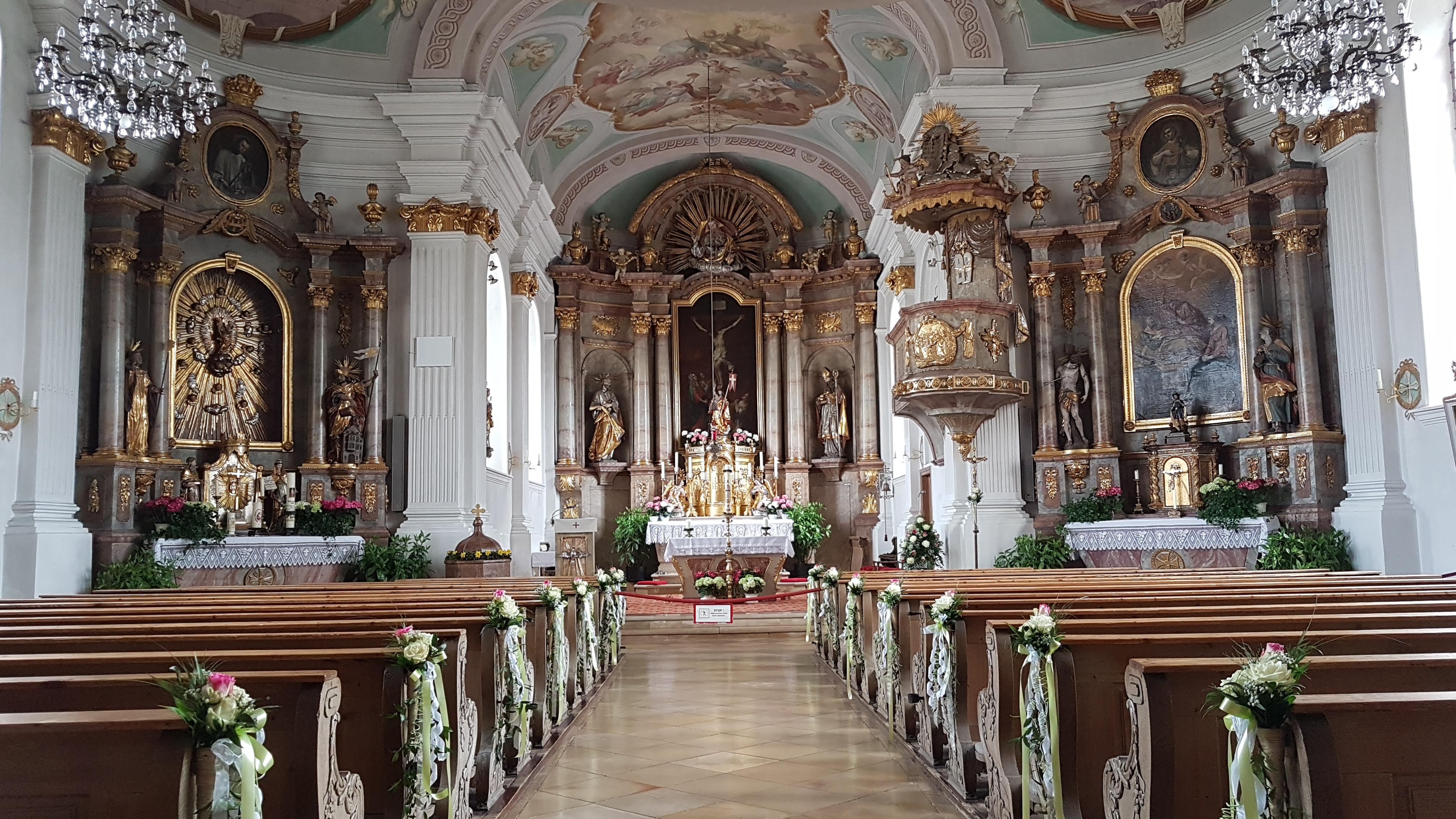 St. Nikolaus (Albaching), Innenraum mit Blick zum Chor